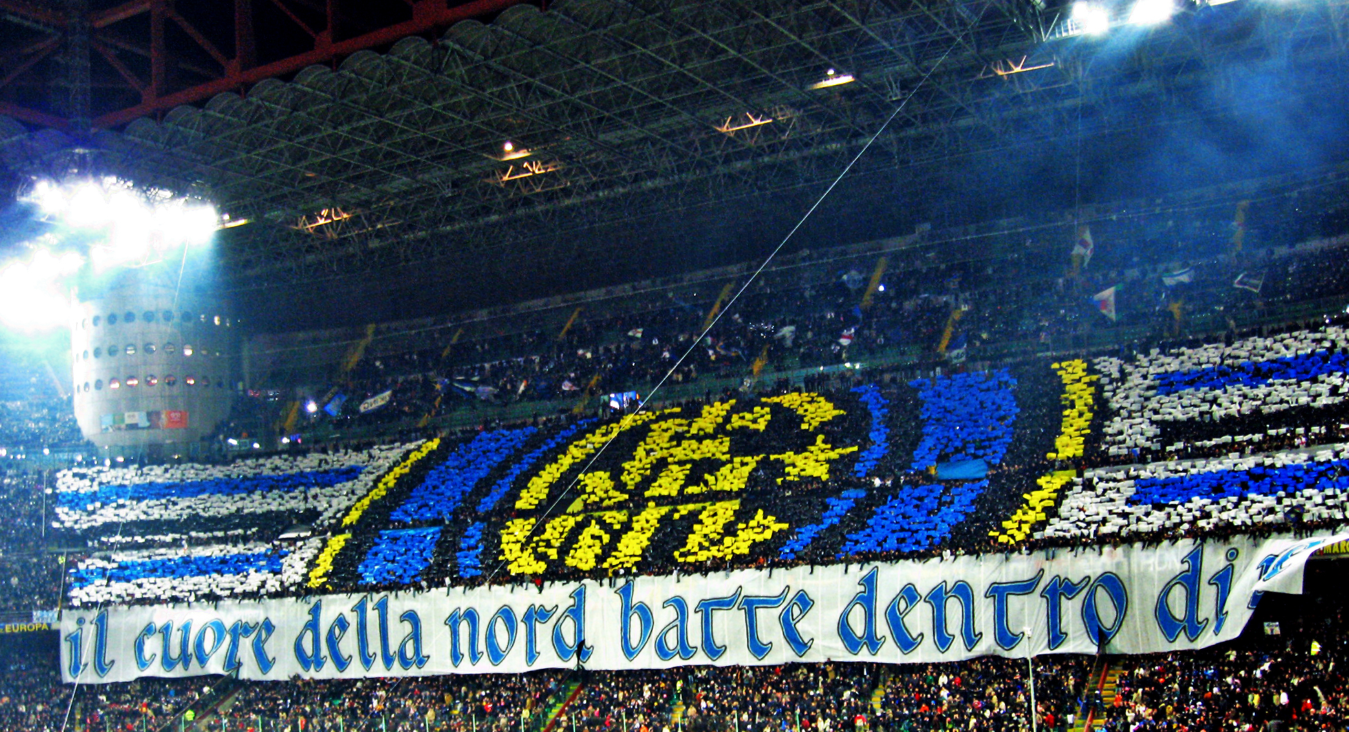 La curva dell'Inter in un derby del 2009